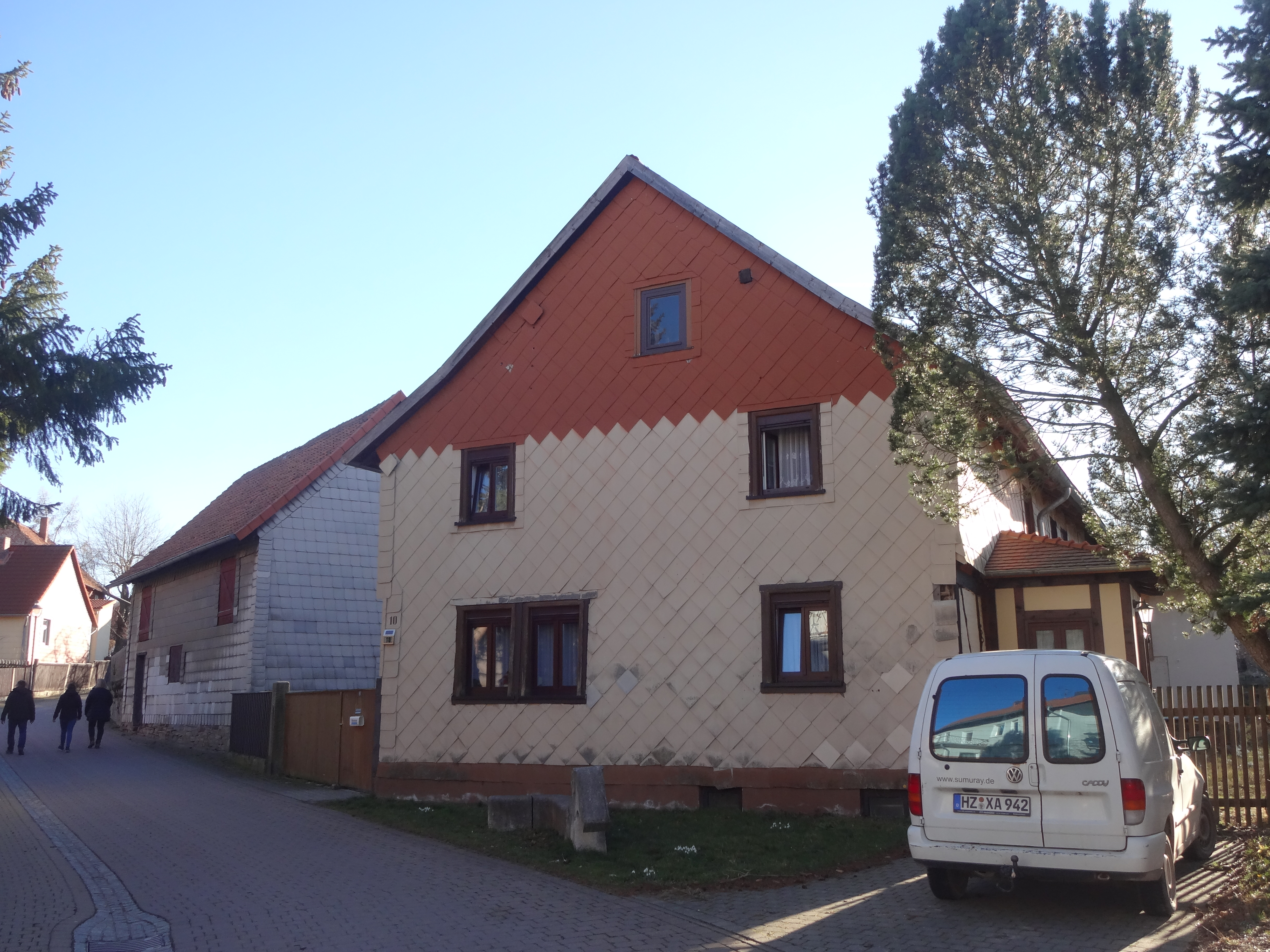 denkmalgeschützte ehemalige Mühle in der Dorfstraße 10 in Darlingerode